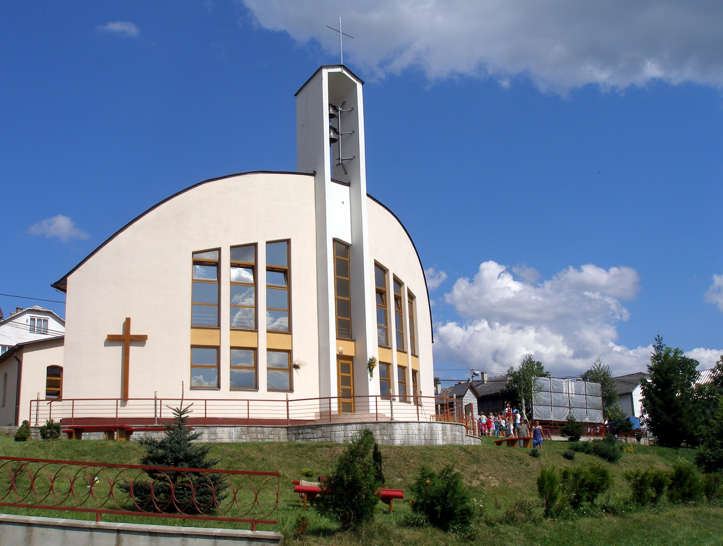 Oslavy 700. výročia prvej písomnej zmienky o obci Oľšov okres Sabinov, región Šariš.